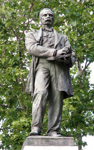 Monumento a Claudio Moyano en la cuesta de Moyano, Madrid.